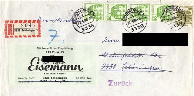 Pelzhaus Eisemann, Einschreiben, vom 27. Juni 1986 Kürschnermeister Eisemann, 3338 Schöningen, Neue Tor 21/22; durchgestrichen: 3420 Herzberg/Harz, Hauptstraße 18